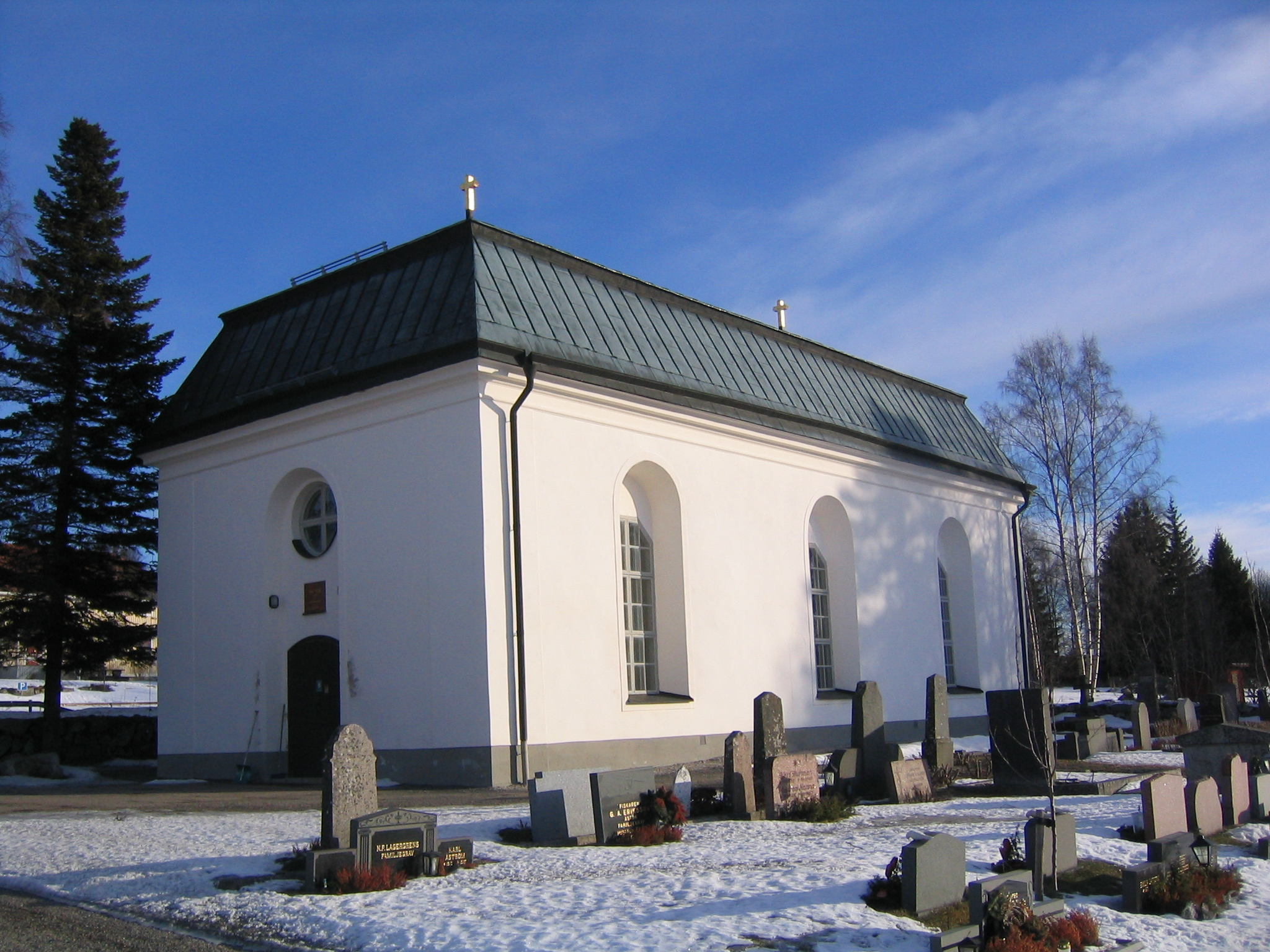 Tynderö kyrka, Tynderö, Medelpad, Sverige